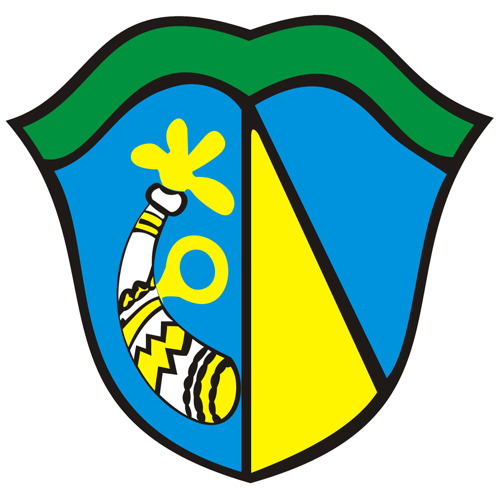 Pellheimer Wappen